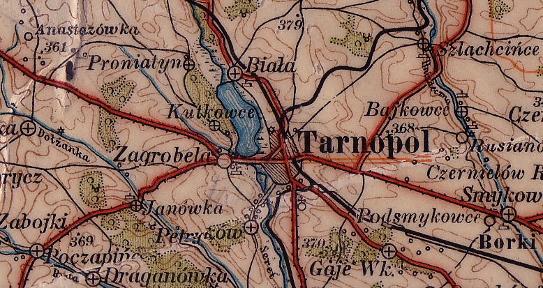 Мапа Тернополя і околиць в польський період ХХ століття